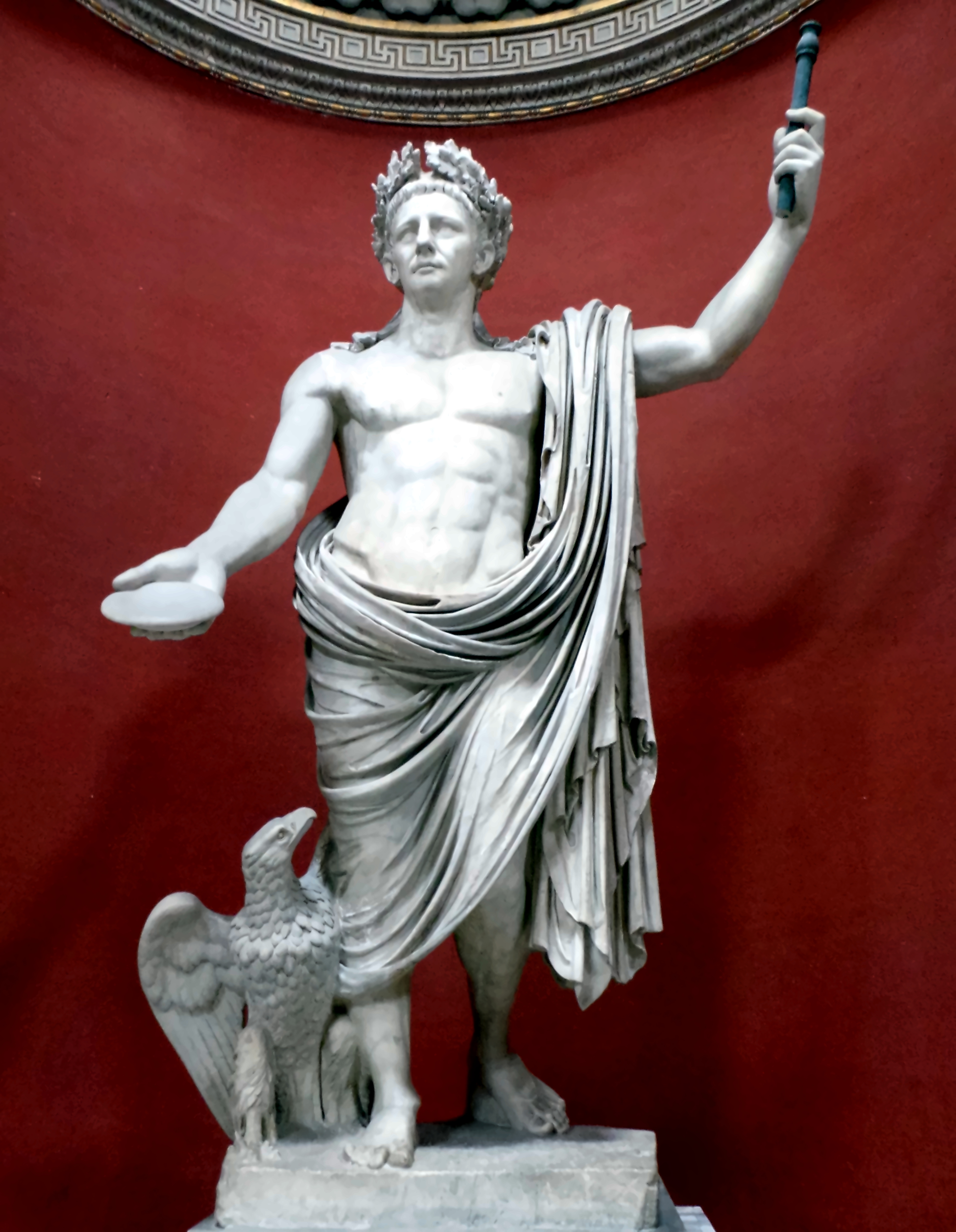 Statue des Claudius in den Vatikanischen Museen